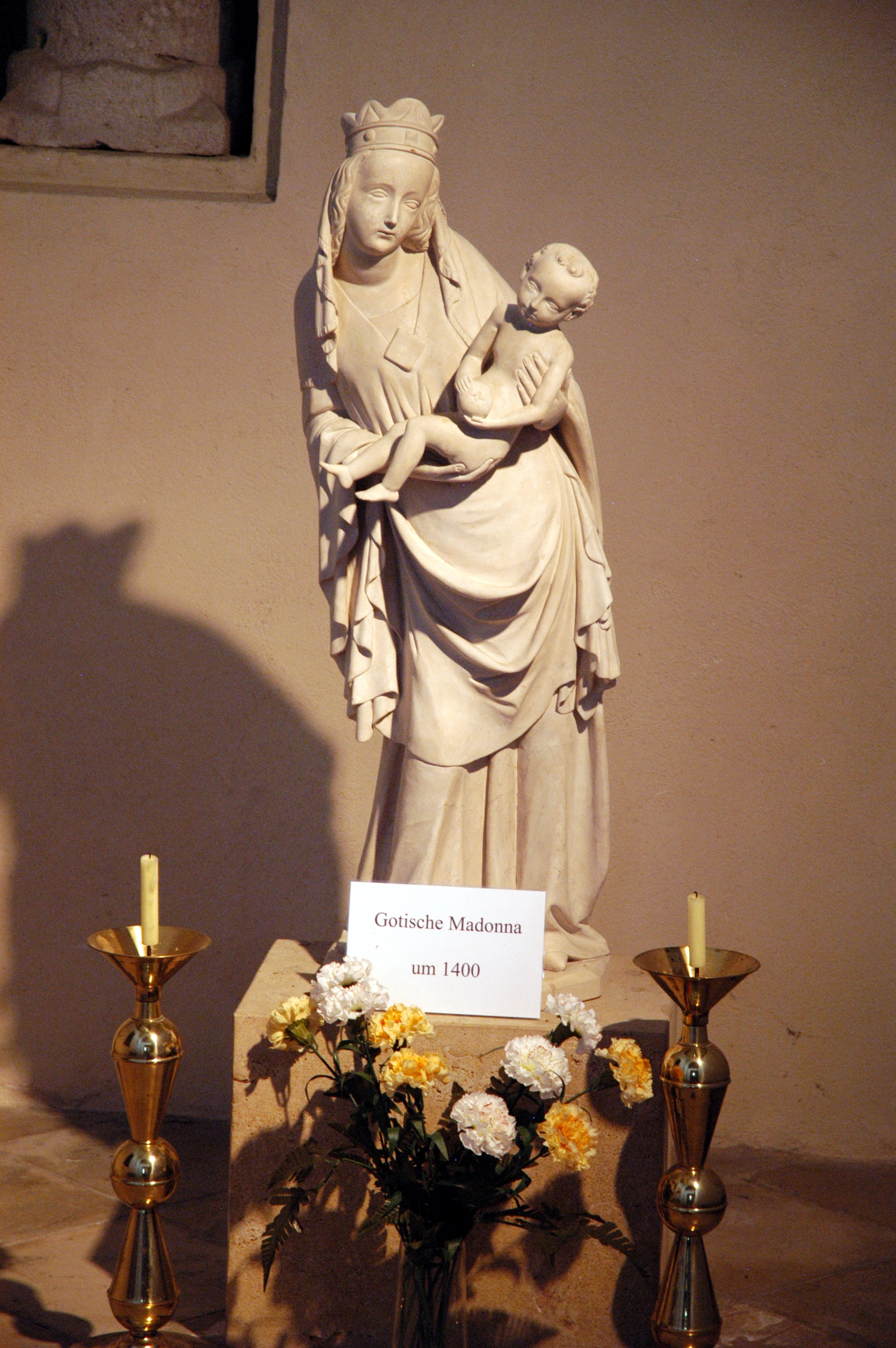 Gotische Madonna in der Kath. Pfarrkirche hl. Jakobus d. Ä.